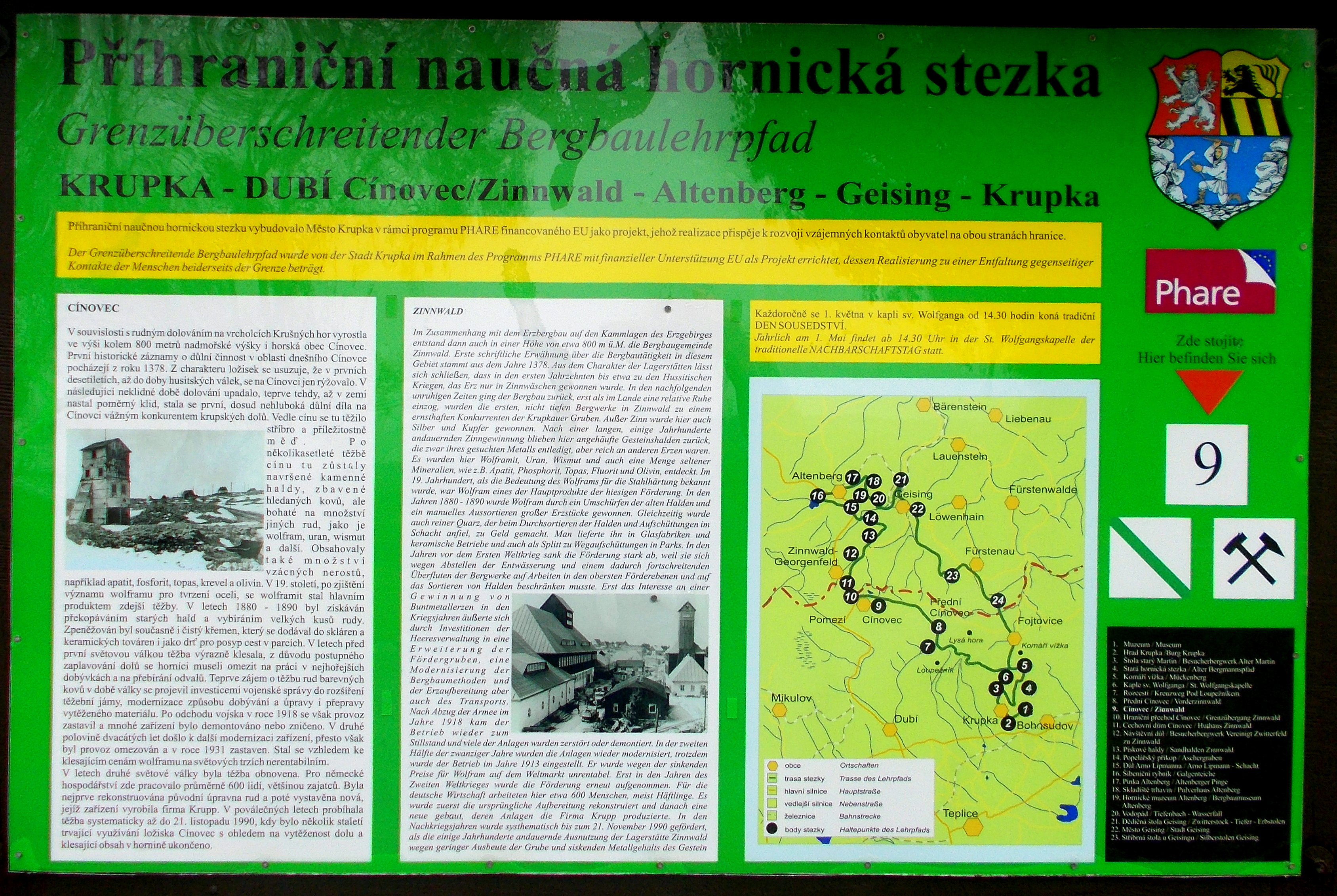 Bergbaulehrpfad Tafel in Cinovec